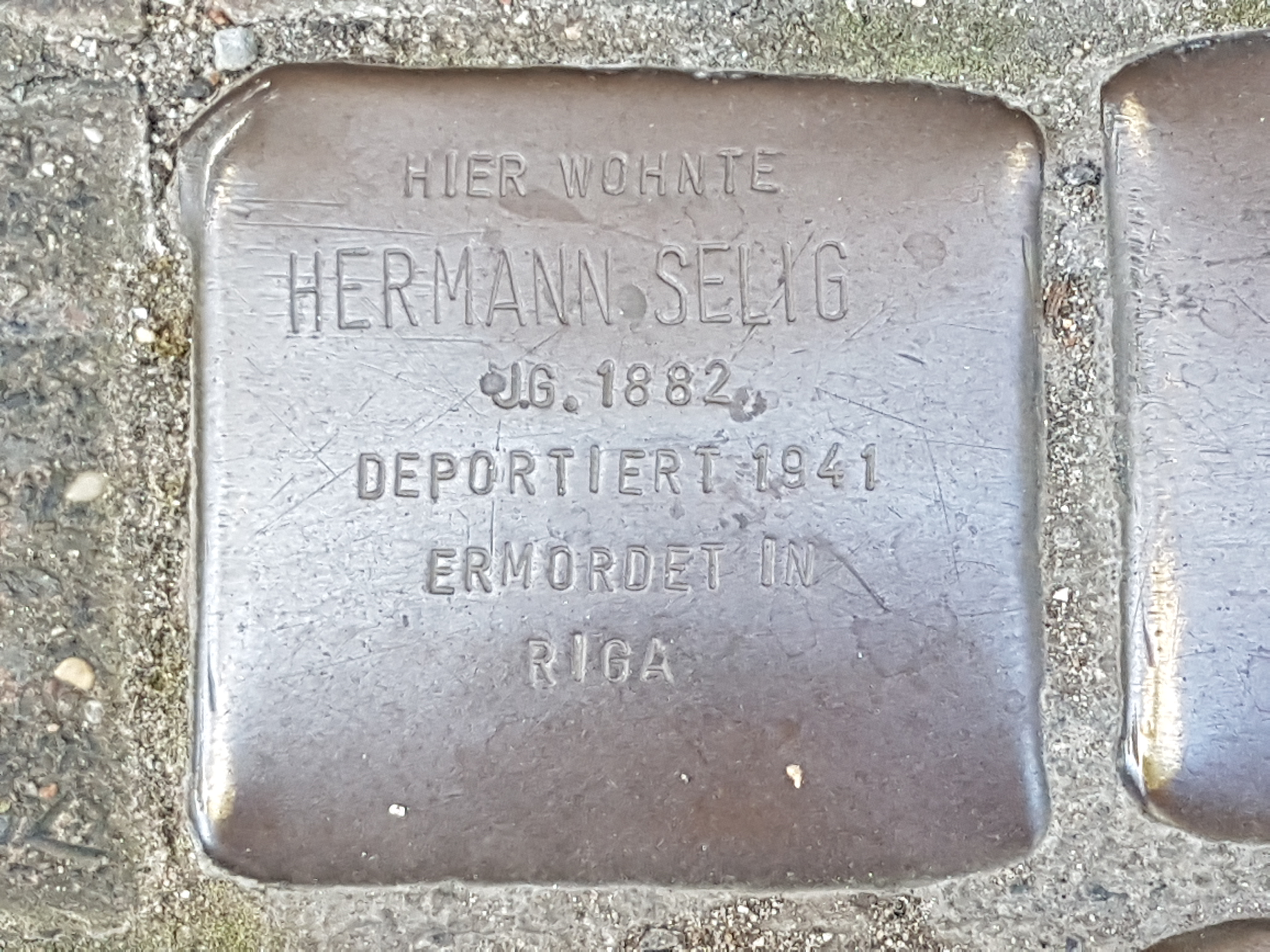 Hermann Selig Stolperstein Duisburg